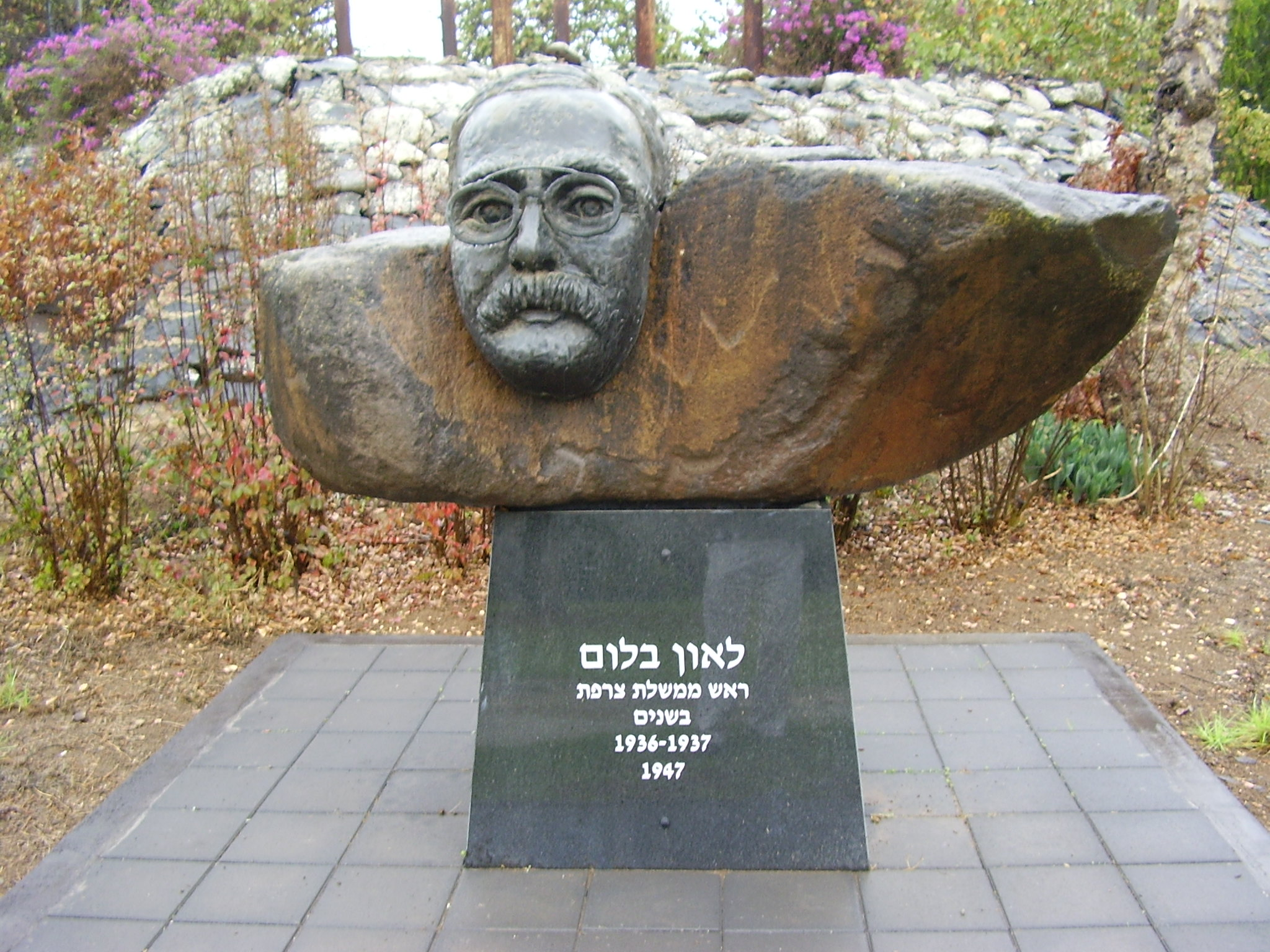 Leon Blum memorial in kibbutz Kfar Blum, Israel